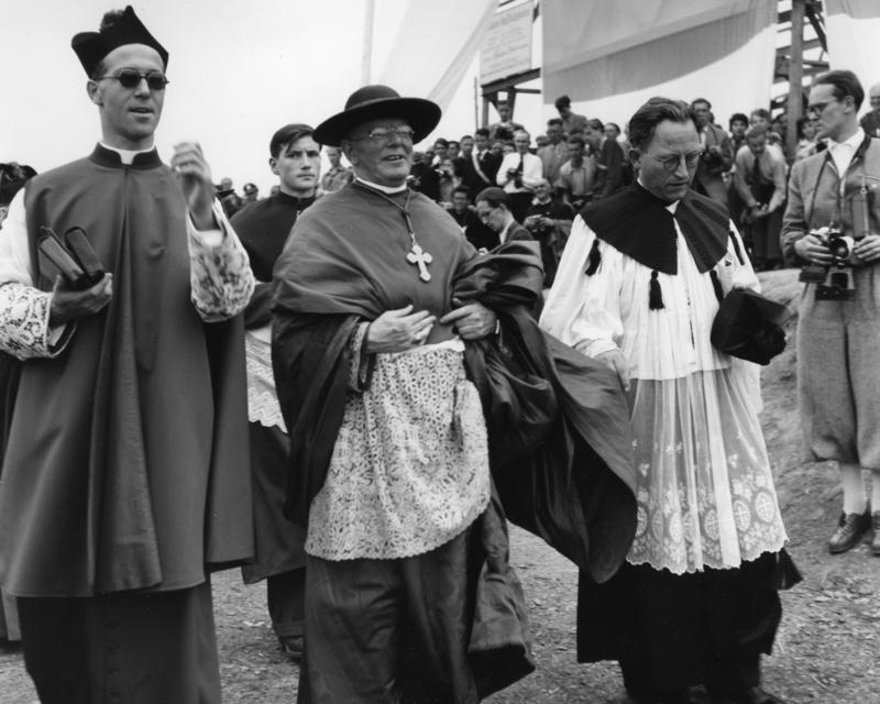 31.8-5.9.1954 76. Deutscher Katholikentag in Fulda Kardinal Griffin, London